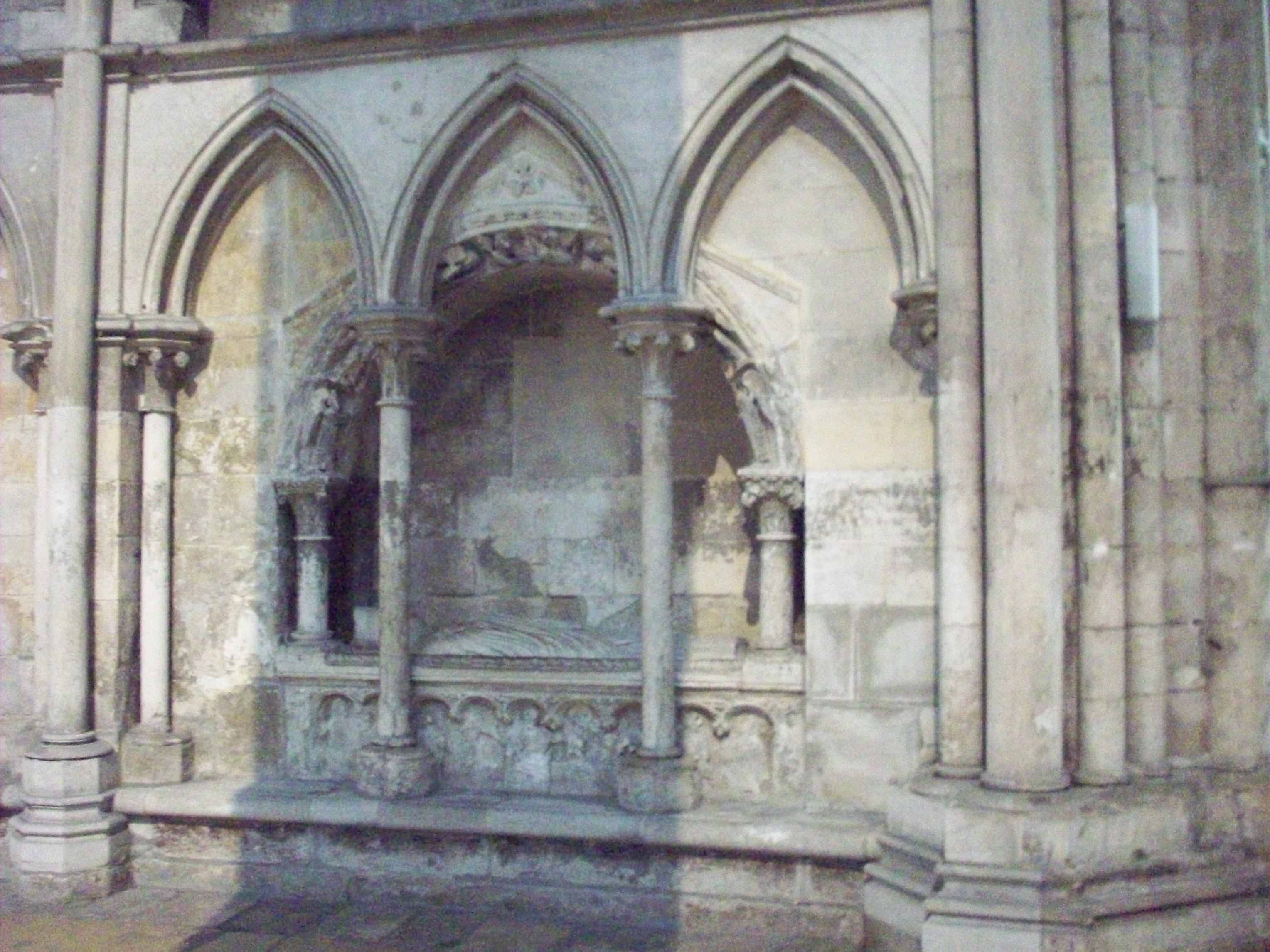 Tombeau d'Hugues d'Amiens, archevêque de Rouen (1130-1164).